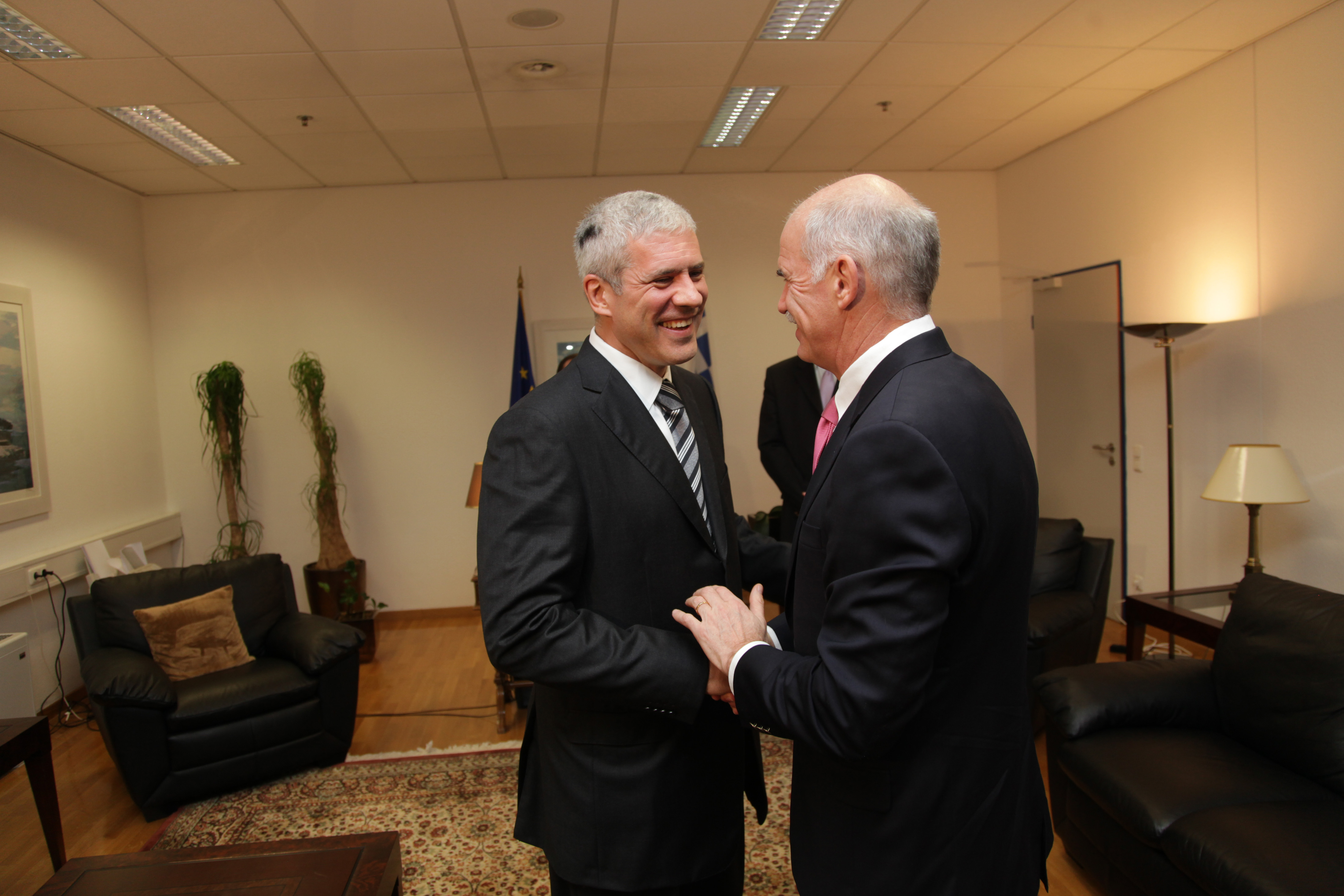 Συνάντηση με τον Πρόεδρο της Σερβίας, Boris Tadic